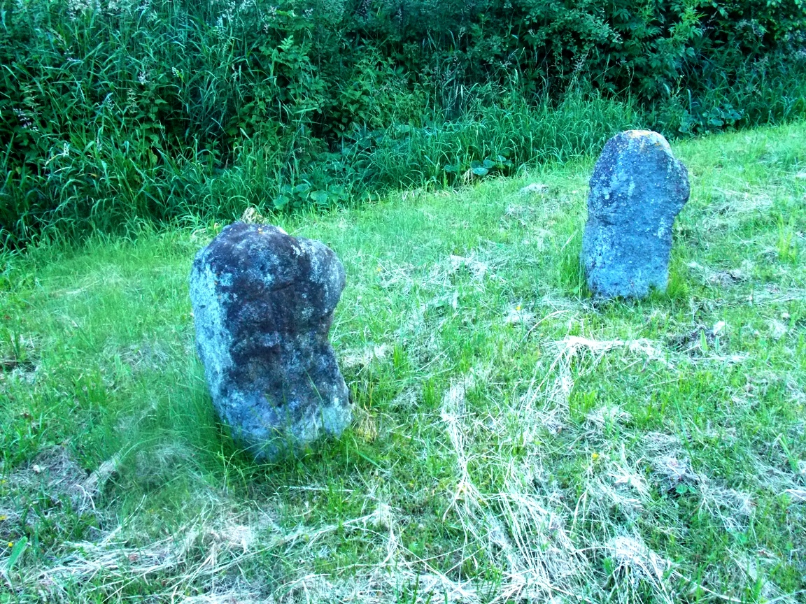 Smírčí kříže Nová Véska